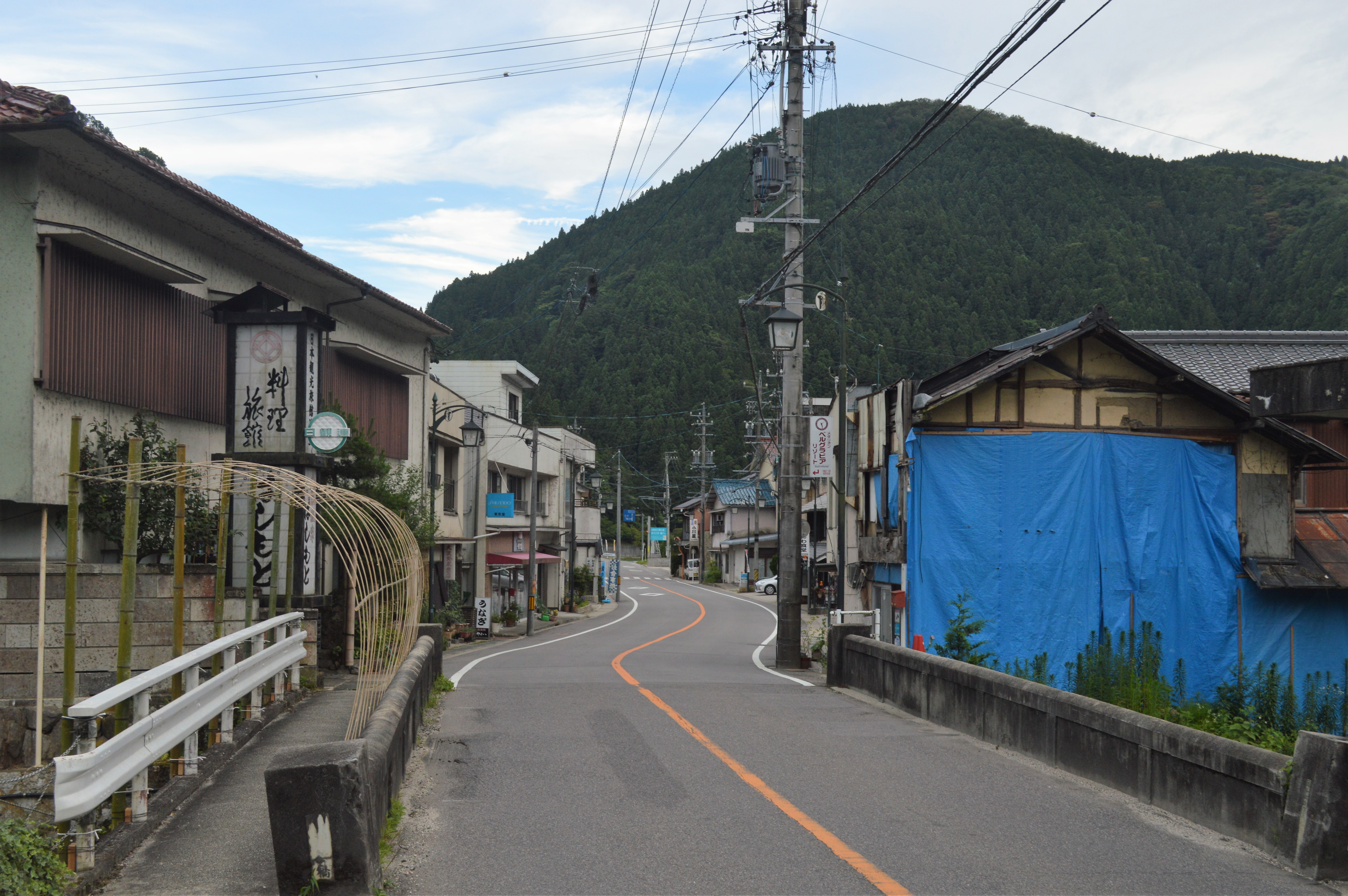 愛知県豊田市小渡町にある小渡温泉（小渡温泉街）。